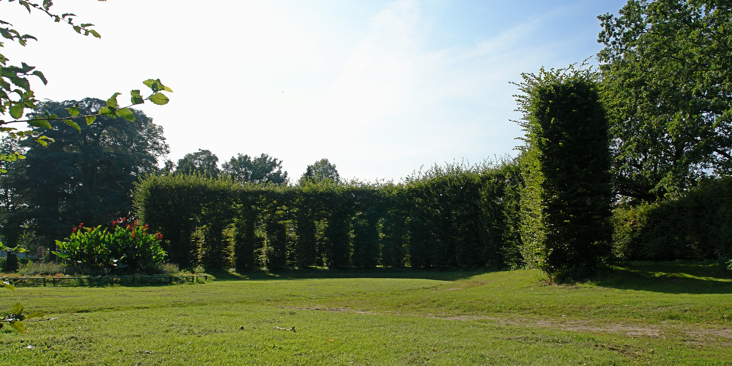 Heinekens Park, Heinekens Landgut, Landgut Schumacher in Bremen, Oberneulander Landstraße 151, 153.Die Gesamtanlage ist ein geschütztes Kulturdenkmal in der Freien Hansestadt Bremen, mit der Nr. 0951 beim Landesamt für Denkmalpflege registriert.